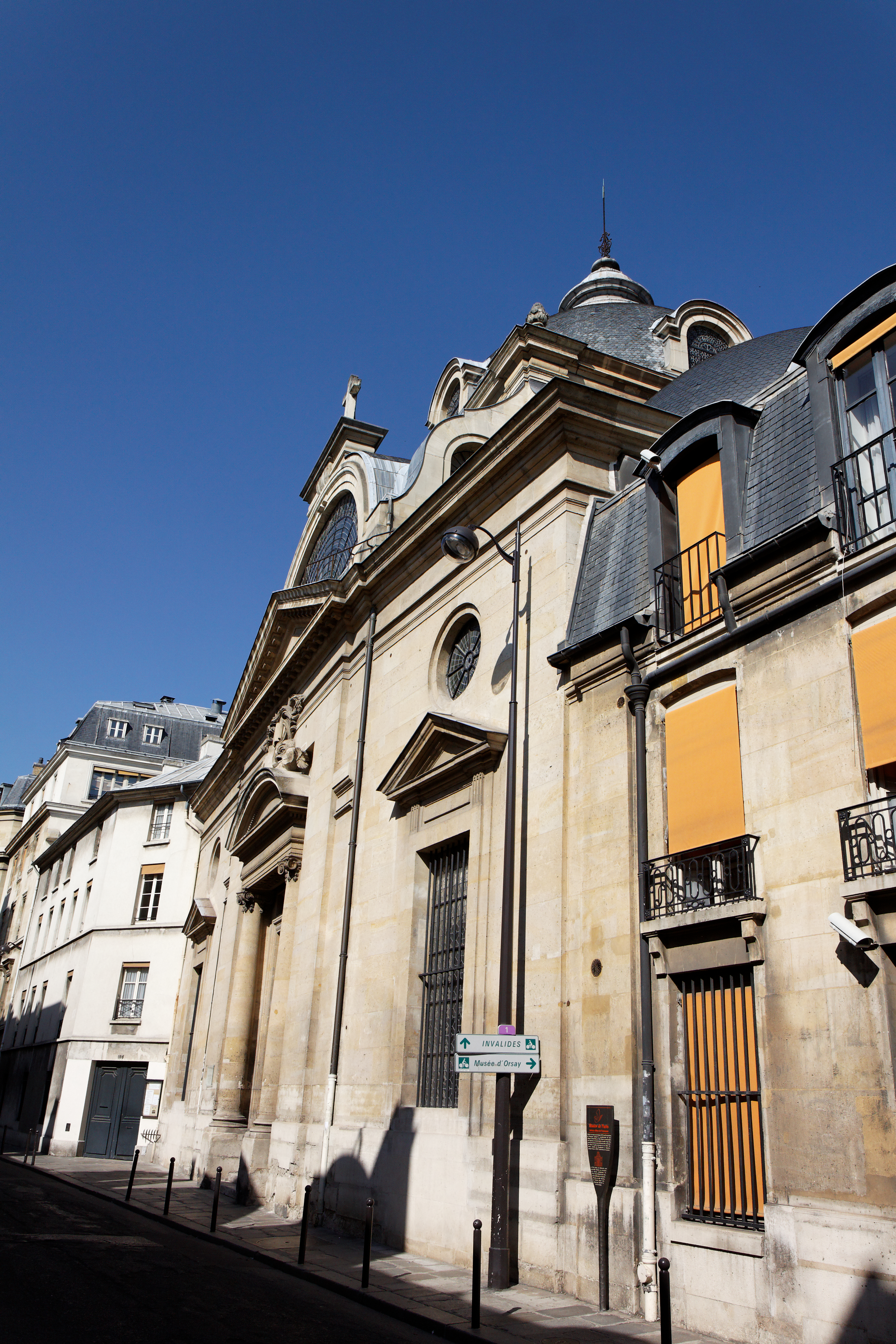 Un monument historique dans le 7ème arrondissement de Paris.